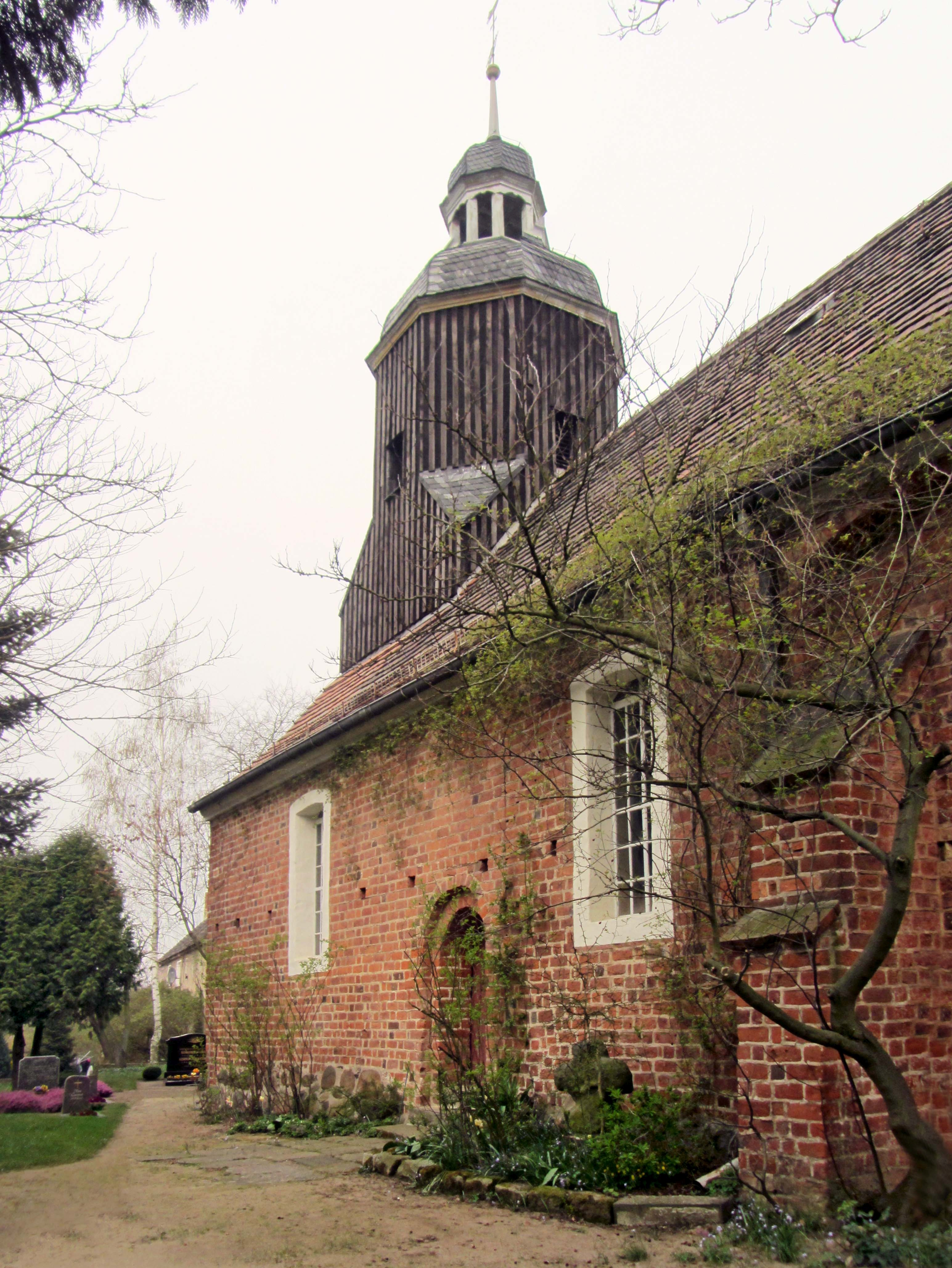 Kirche und Steinkreuz, Hauptstraße in Uebigau-Wahrenbrück OT Saxdorf